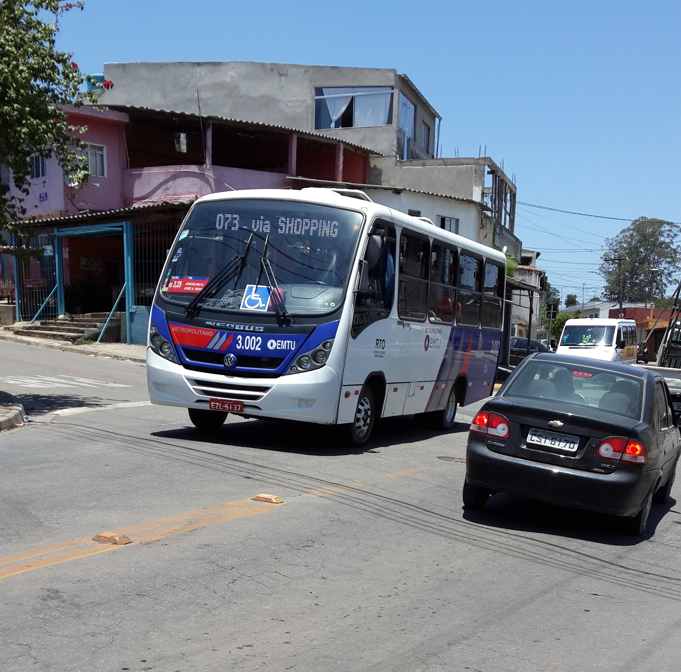 Foto tirada no bairro do Bonsucesso em Guarulhos - SP.